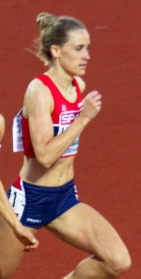 625 finale 800m dames